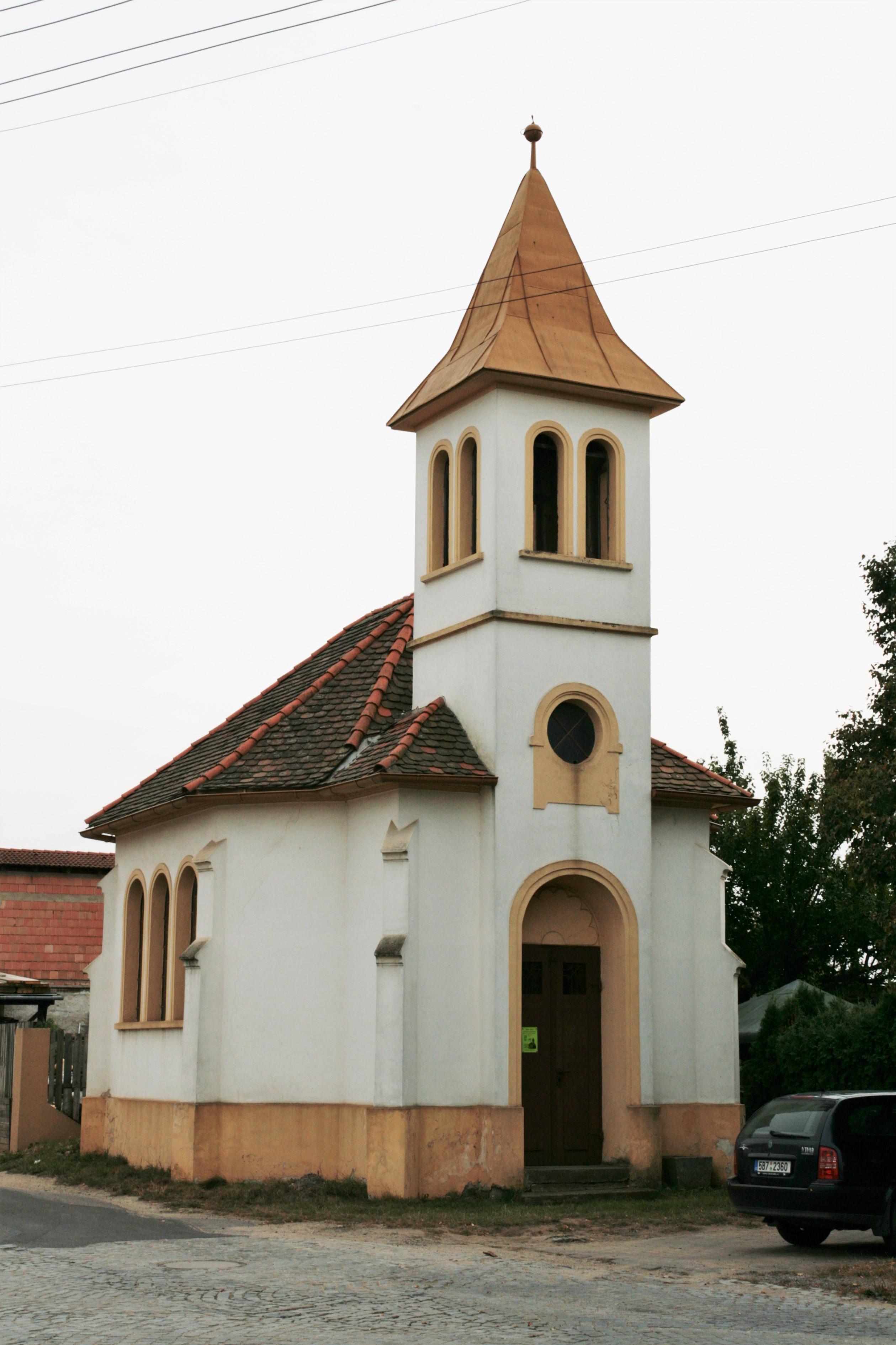 Oblekovice, část okresního města Znojmo v Jihomoravském kraji. Kaple v Bohumilicích.